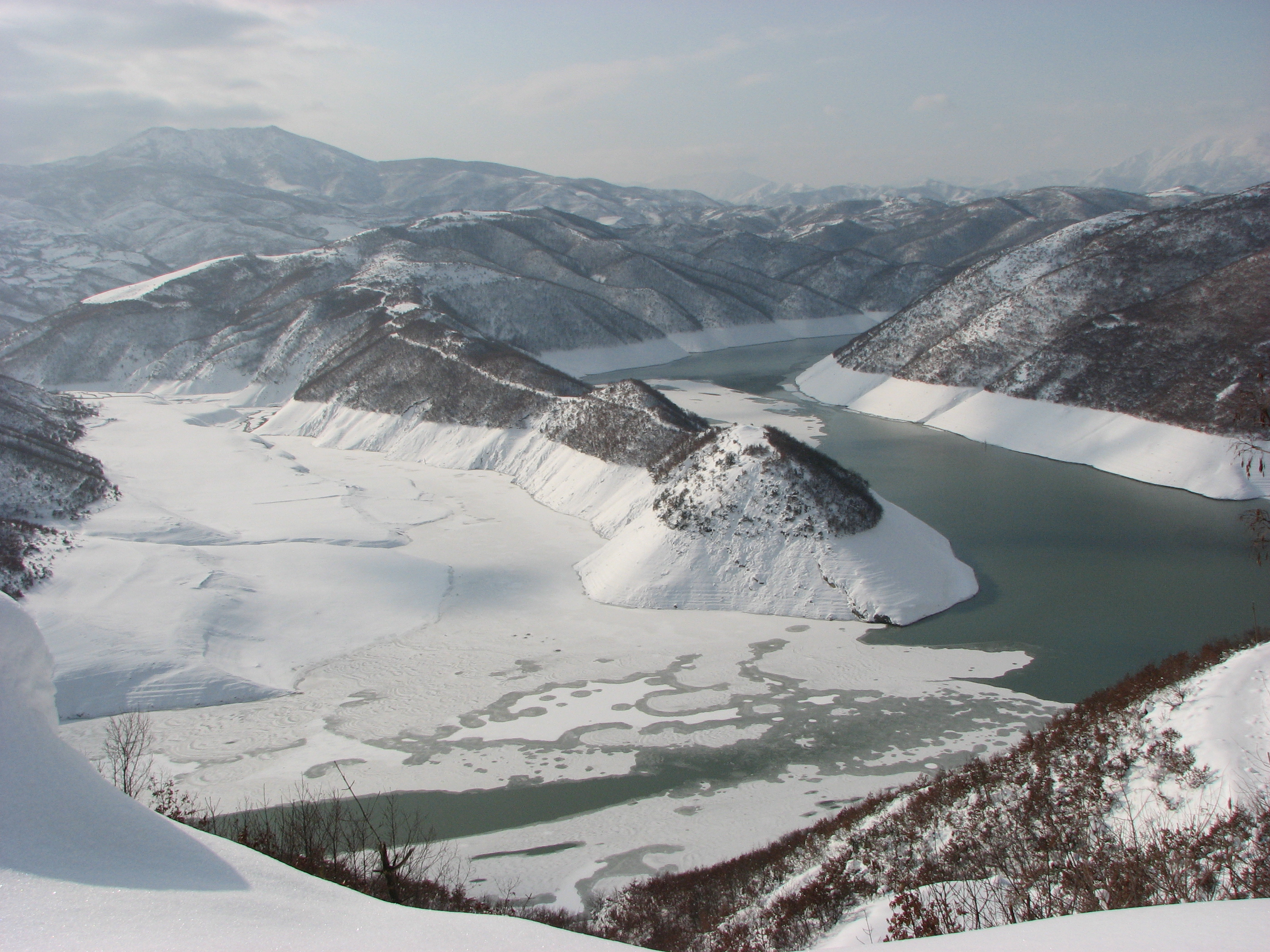 Koka e Gjarprit ndodhet në zonën e komunës Kalimash dhe zgjatet si gadishull në Liqenin e Fierzës, duke krijuar një imazh mjaft intrigues.